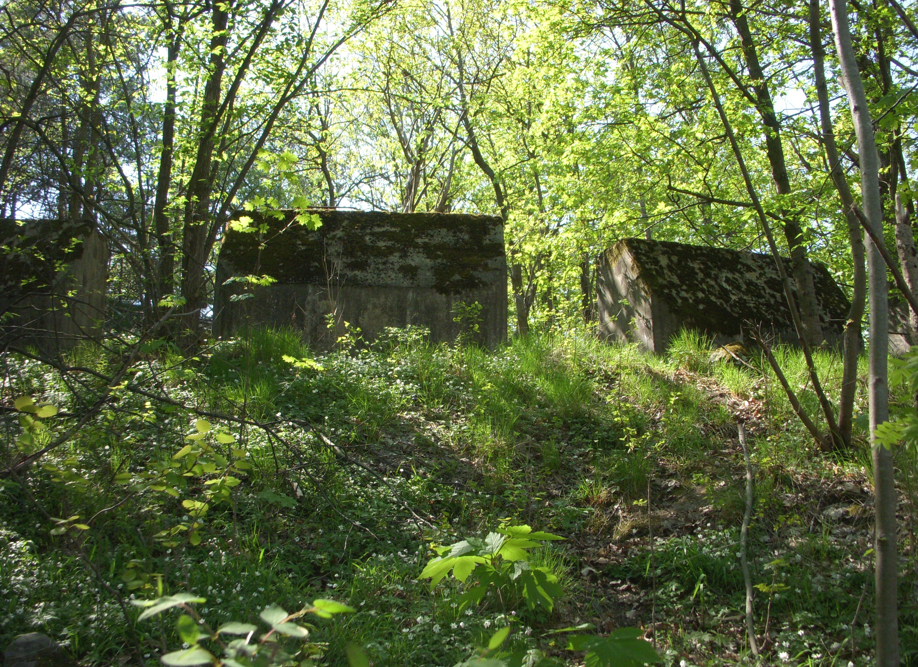 Norra Djurgårdens stridsvagnsspärr (betongpiano)